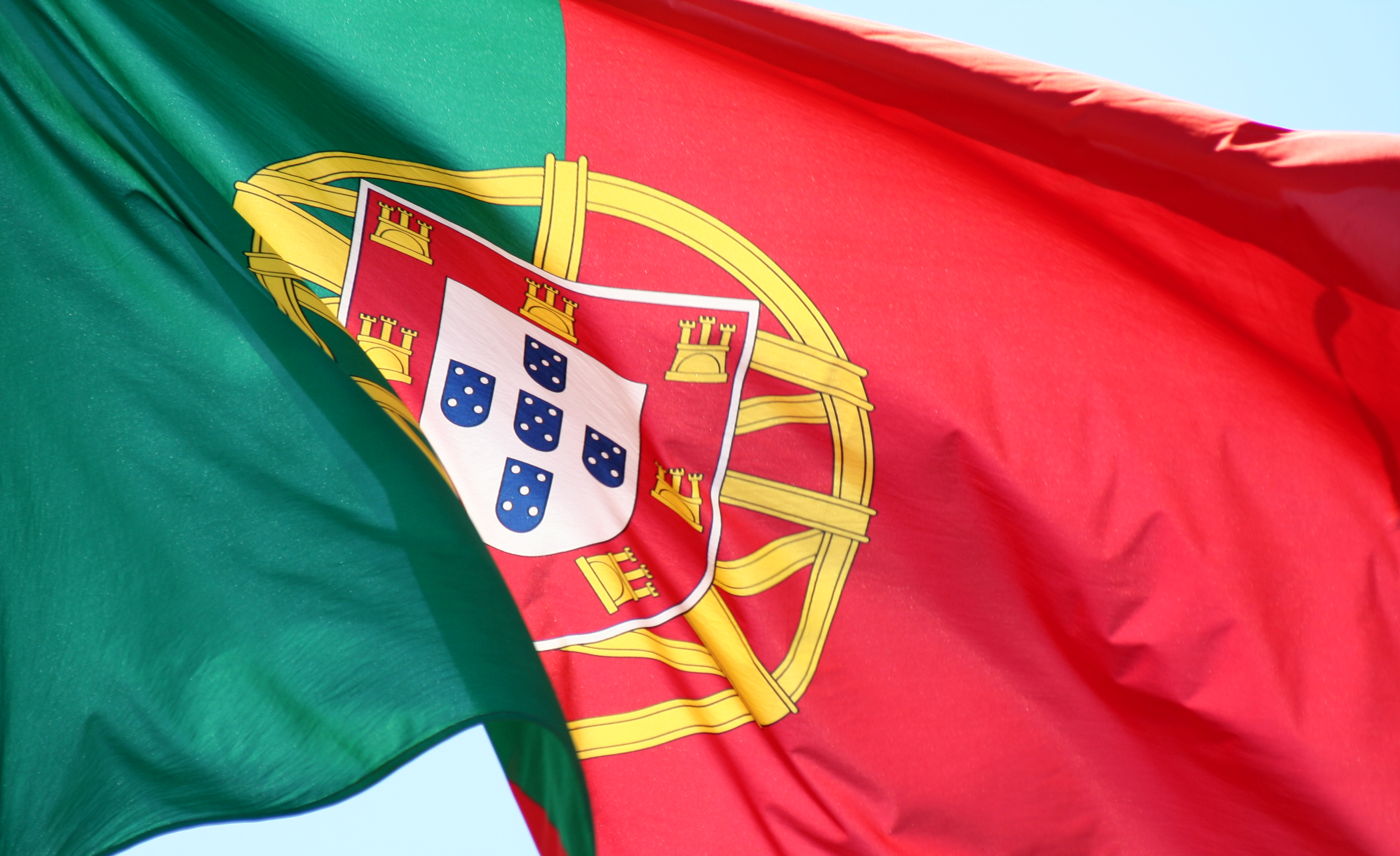 Bandera portuguesa